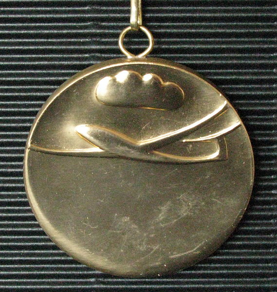 Rückseite der Siegermedaille des Barron Hilton Cups